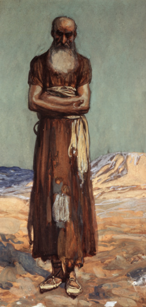 Пророк Наум